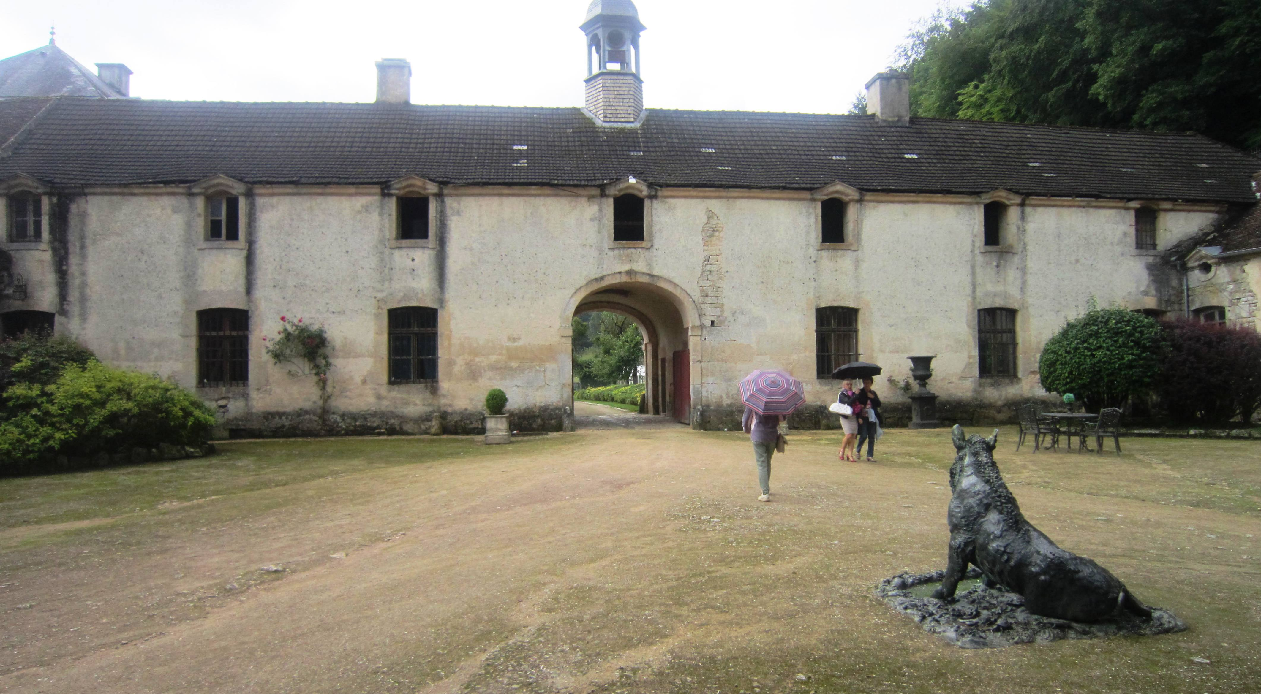 Abbaye du Val des Choues, vue intérieure